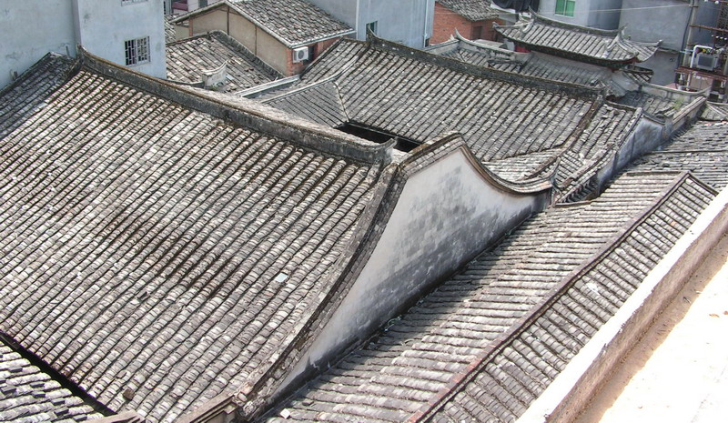 典型福州建筑的封火墙，LuHungnguong摄于福州罗源县岐余郑氏祠堂。